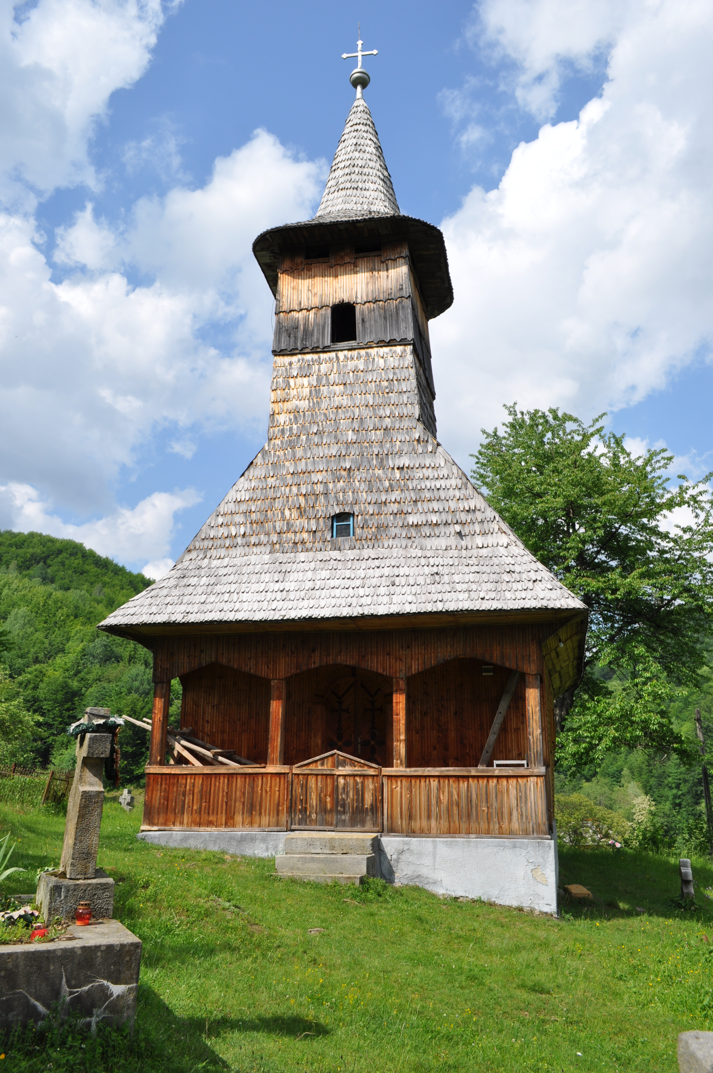 Biserica de lemn "Cuvioasa Paraschiva", sat IZVOARELE; comuna CERNEŞTI